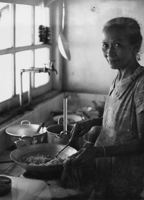 Negatief. Portret van een vrouw die nasi goreng bereidt in de keuken